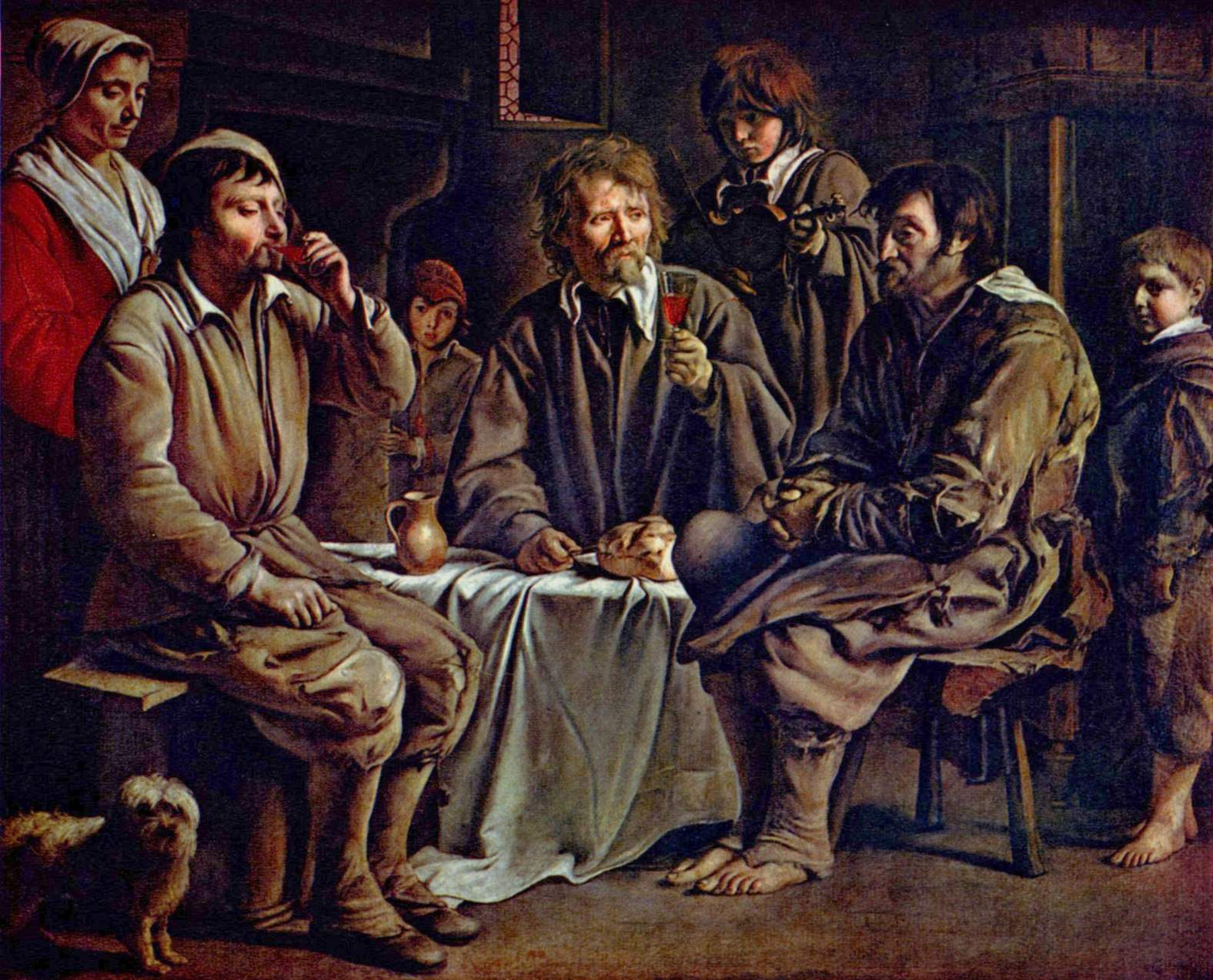 intérieur d'un paysan aisé (vitres à la fenêtre, meuble qui luit. Deux catégories de paysans: à gauche, paysan aisé (laboureur) à droite paysan pauvre (manouvrier ou valet de ferme.)